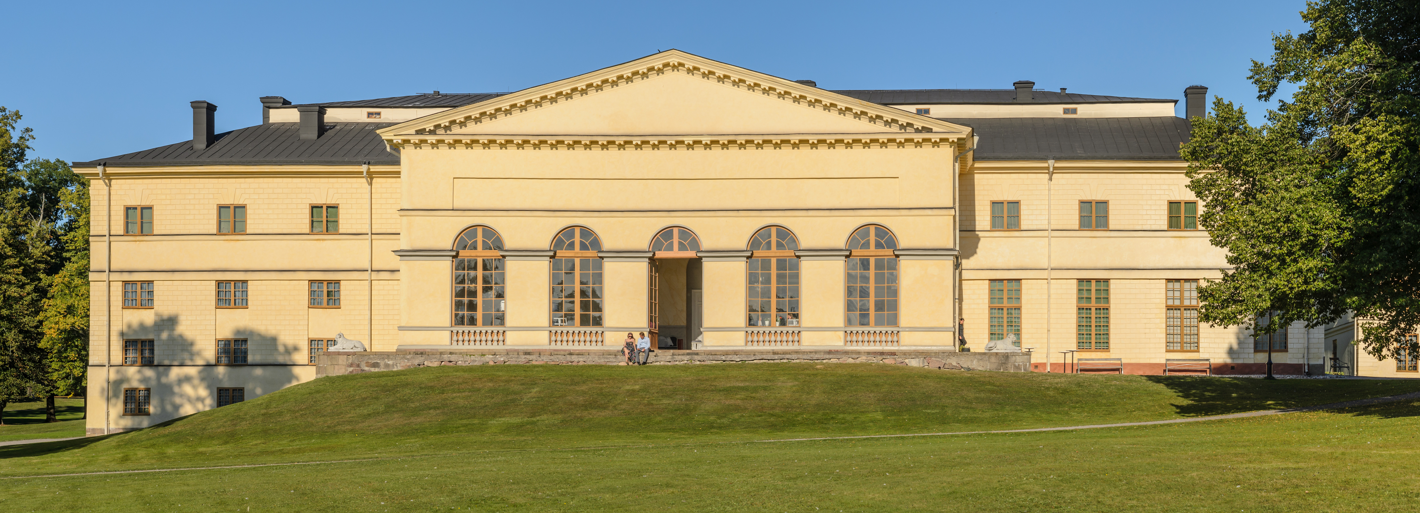 Drottningholm Palace Theatre (west facade). Part of Royal Domain of Drottningholm - World Heritage Site. This image was created with Hugin.